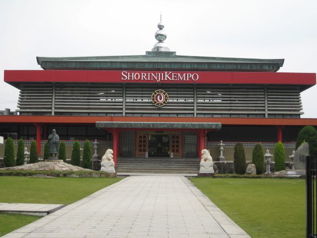 少林寺拳法総本部 香川県多度津町